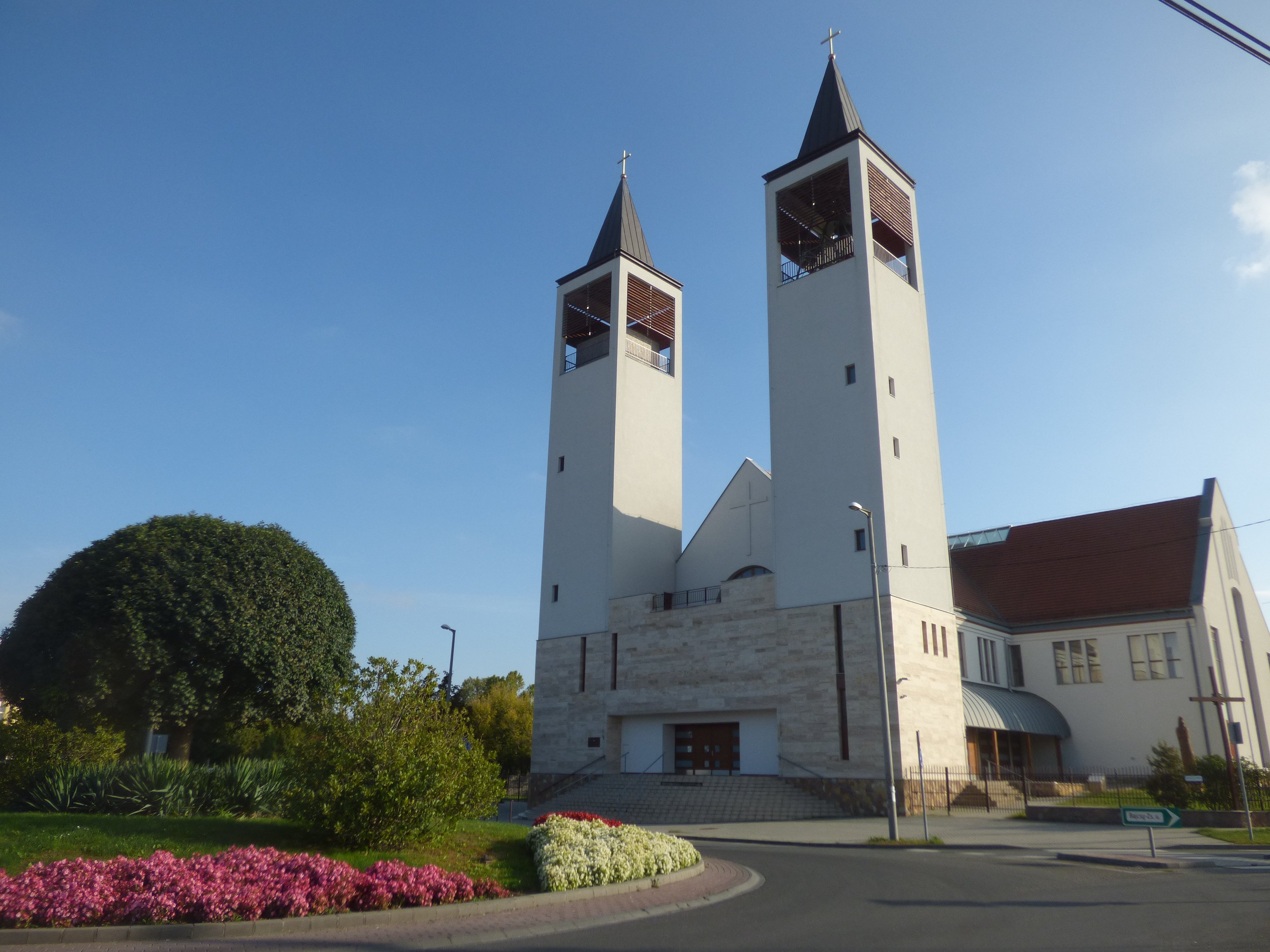 Szigetszentmiklós római katolikus temploma